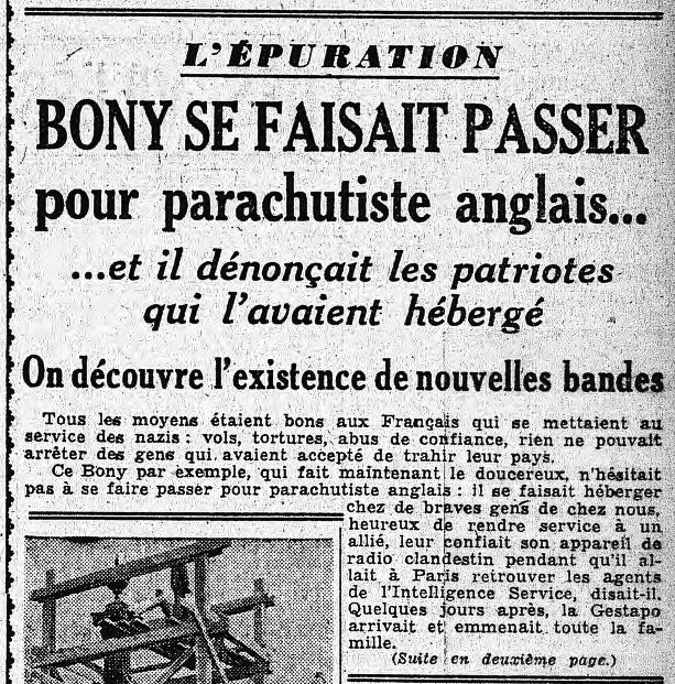 Le journal l'Humanité titre en Une sur Pierre Bonny avant le procès de la Gestapo française de la rue Lauriston (son nom est incorrectement orthographié).